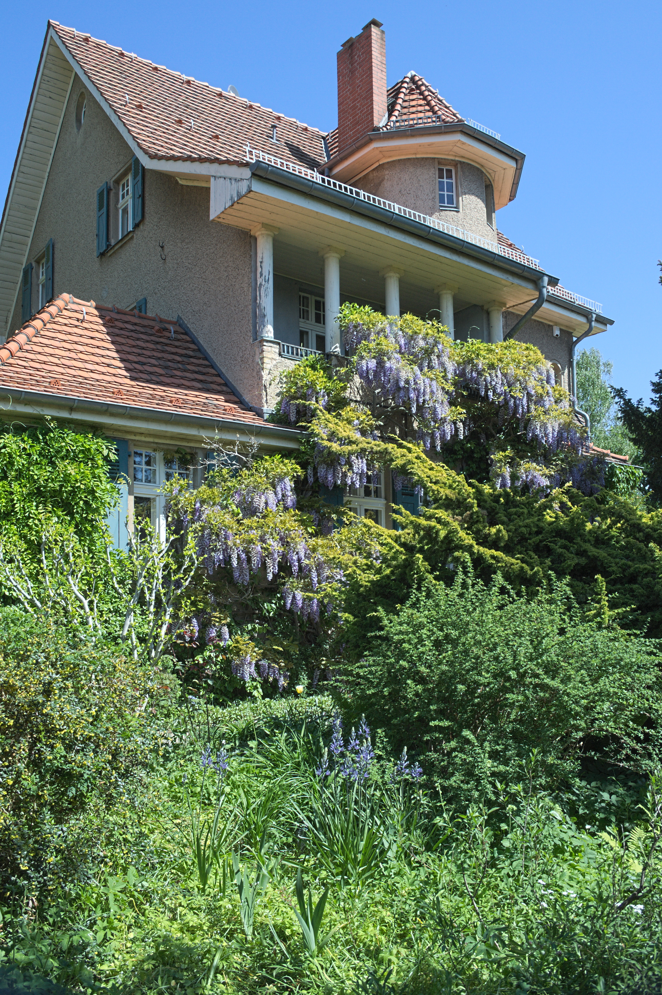 Karl-Foerster-Garten Am Raubfang 6, 14469 Potsdam-Bornim seit 1981 sind Haus und Garten denkmalgeschützt